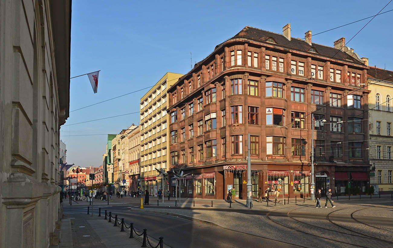 Dom pod Świętym Hieronimem